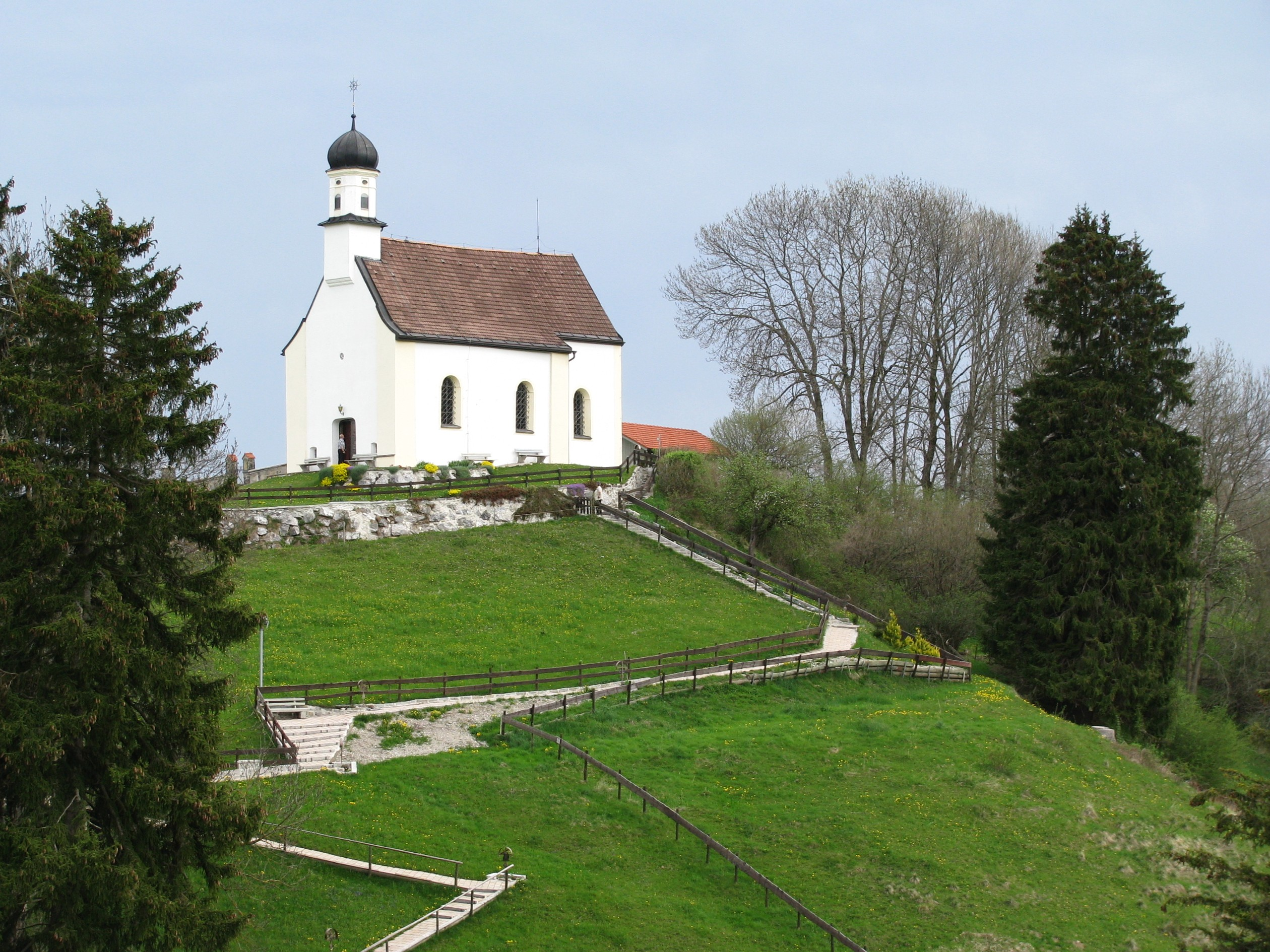 Berghof, Gem. Halblech, kath. Kapelle St. Peter, erbaut Ende 17. Jh.